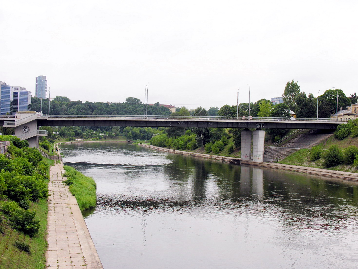 Vilnius Liubarto tiltas Foto: Algirdas, 2006 m. rugpjūčio 8 d., Lietuva